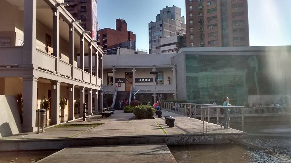 Paseo del Buen Pastor. En la galería se desarrollan diversas actividades.